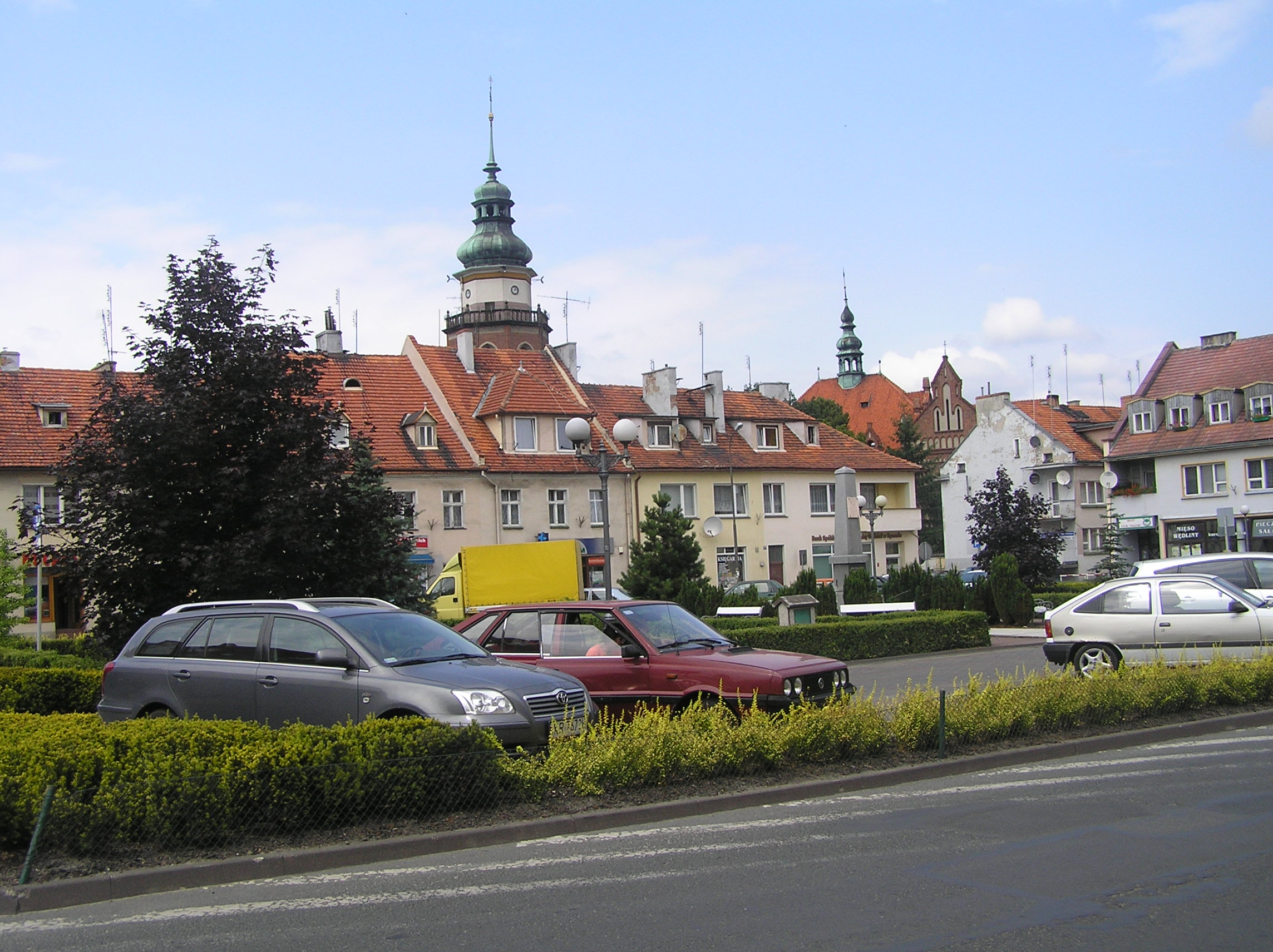 Rynek w Sycowie